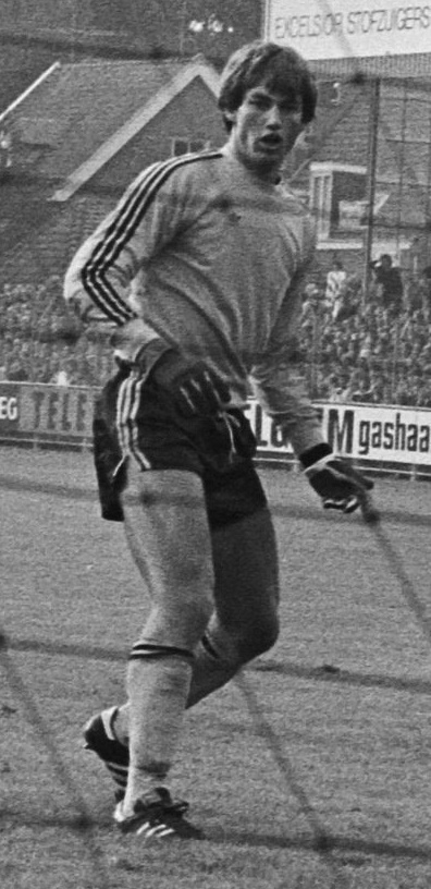 AZ67 tegen Volendam 1-1, Billy Bond haalt kopbal van Van Hanegem (links) van doellijn, 2e van links doelman Frans Hoek.